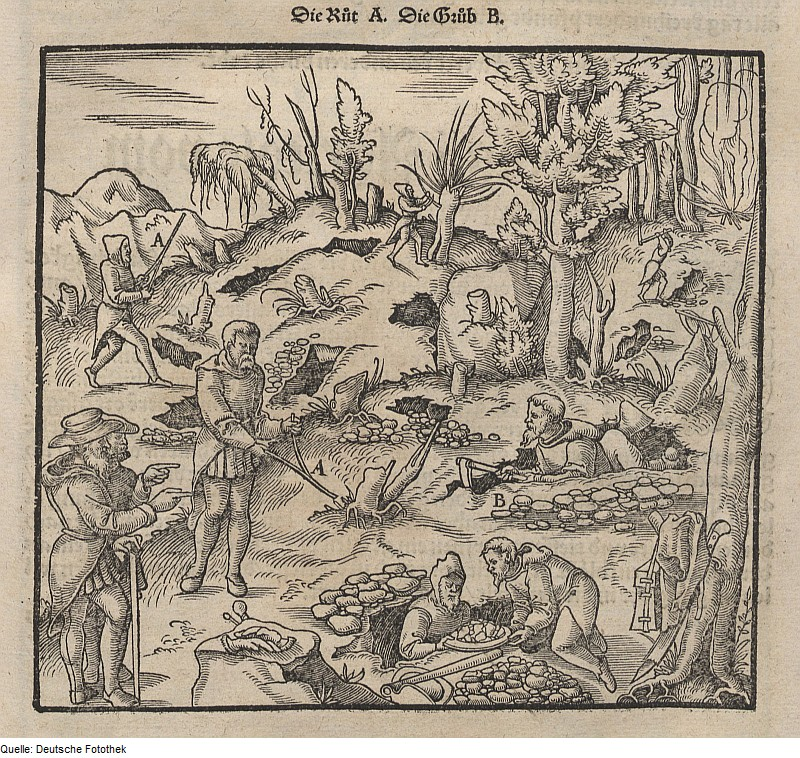 Original image description from the Deutsche Fotothek Bergbau & Bergwerk & Rute & Grube & Rutengänger